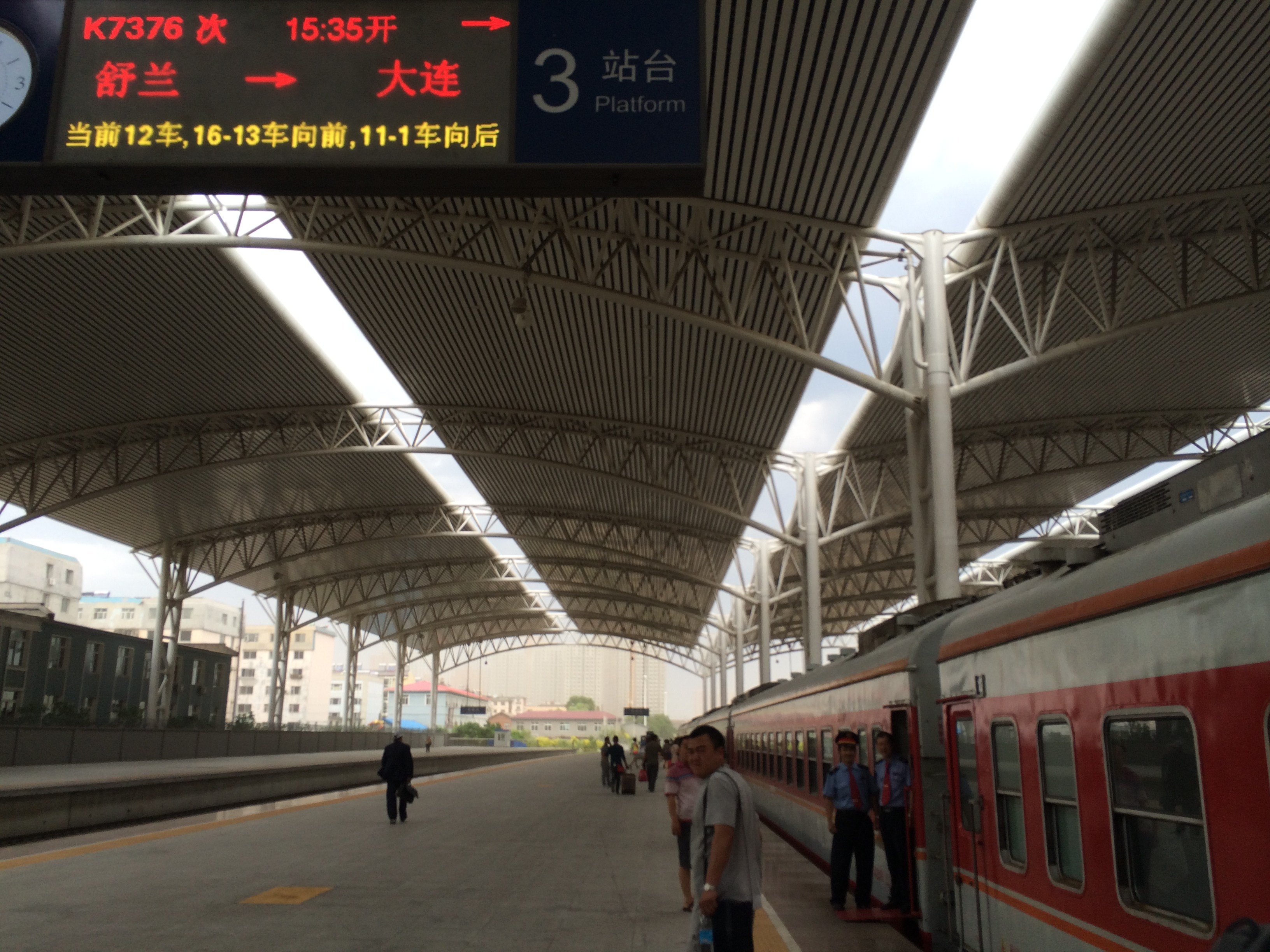 吉林站3站台，K7376次列车等待发车